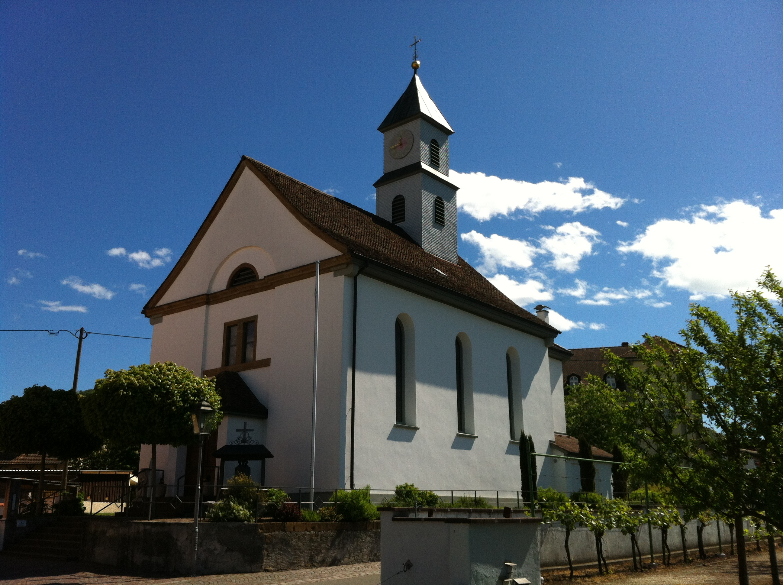 KB Küssaberg, Gemeinde im Landkreis Waldshut in Baden-Württemberg. Ortschaft Kadelburg — Katholische Kirche St. Martin.